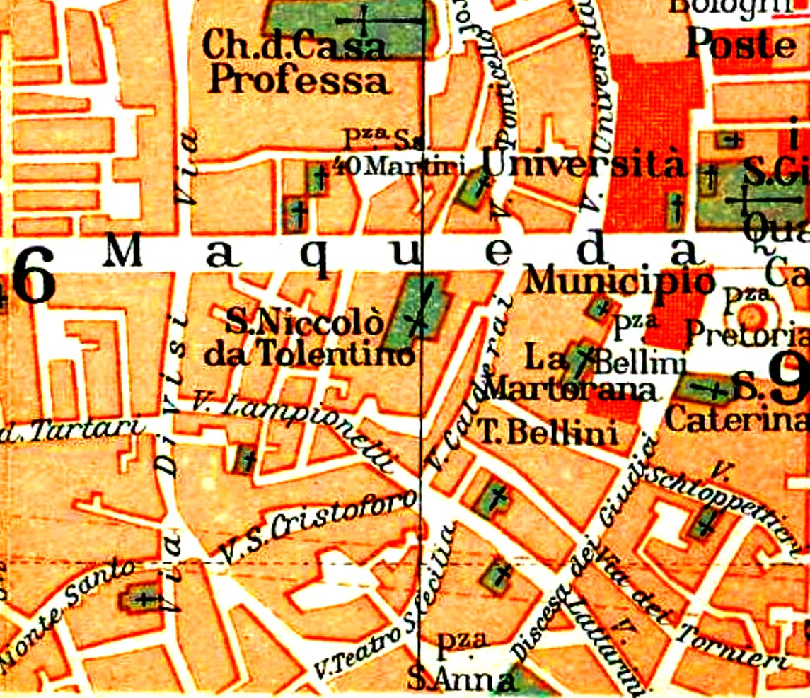 carta